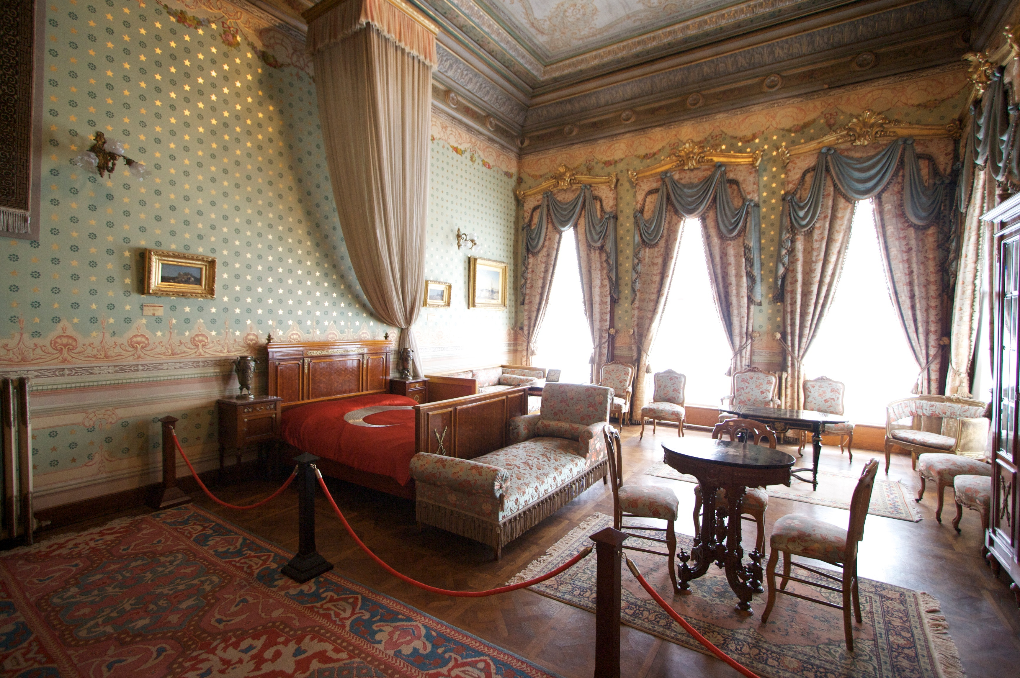 Atatürk'ün hayatını kaybettiği Dolmabahçe Sarayı'ındaki odası.